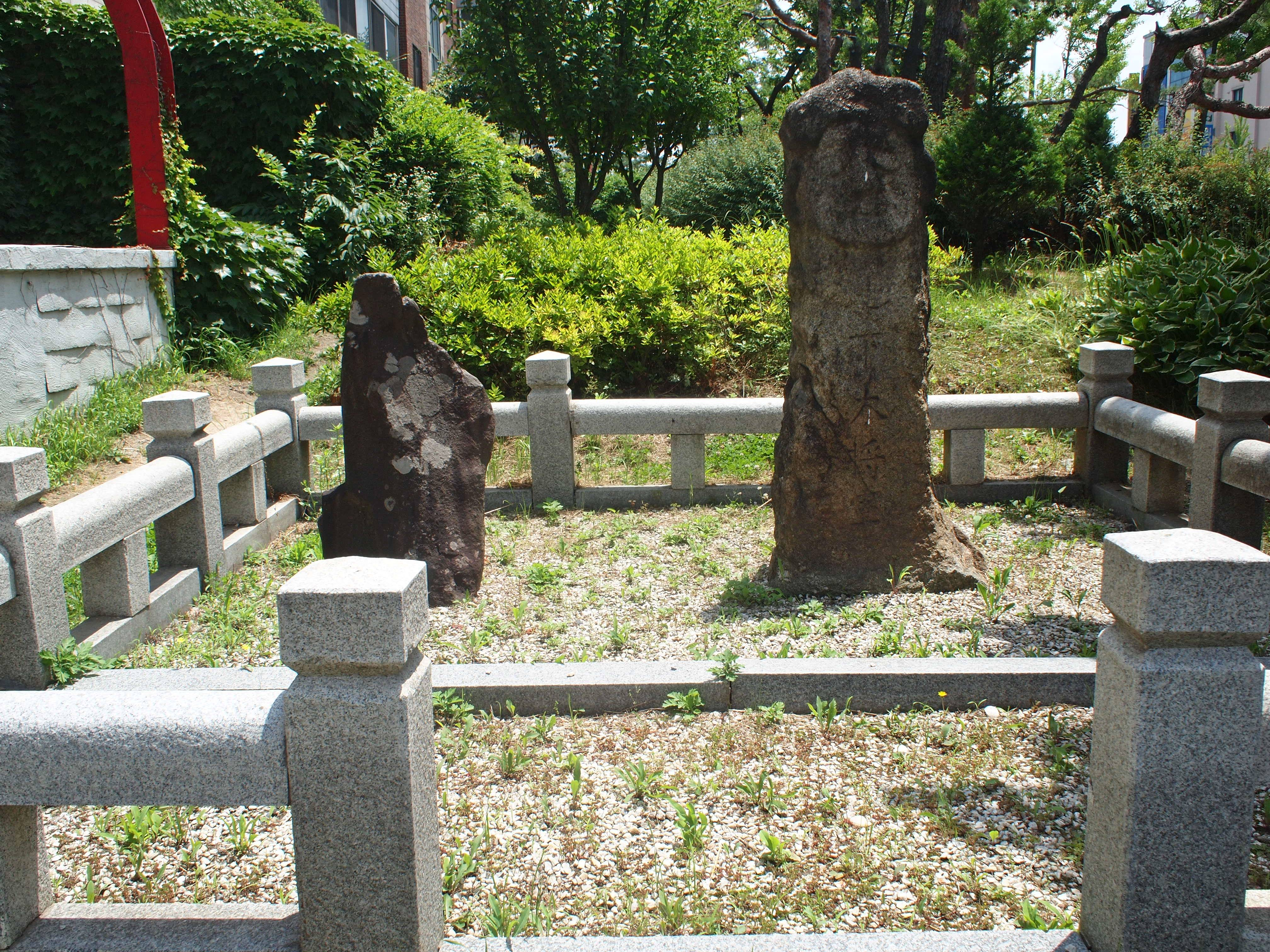 Stone Guardian Posts of Beop-dong